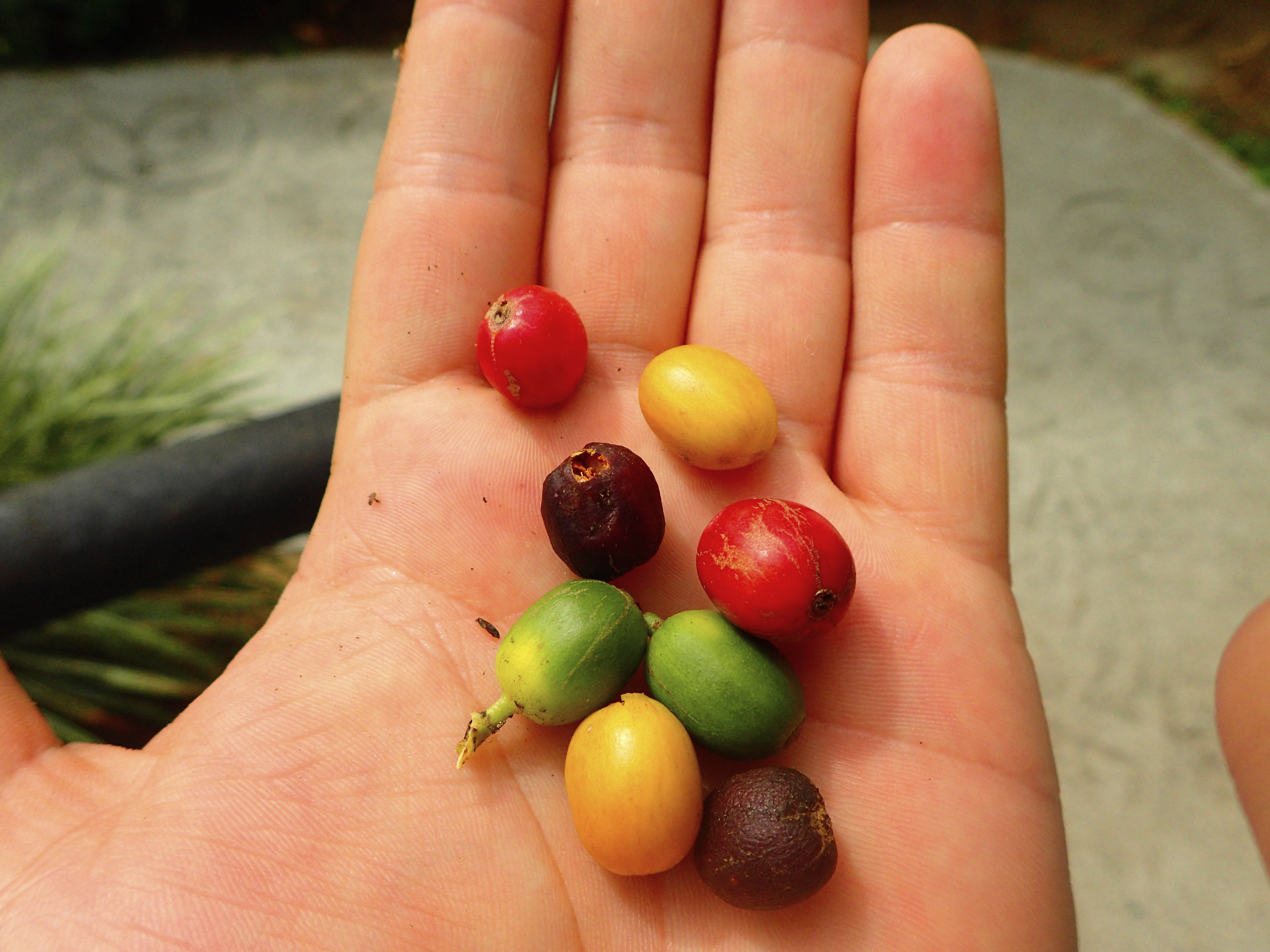 Granos de Cafe en distintas tonalidades según maduración en la planta.